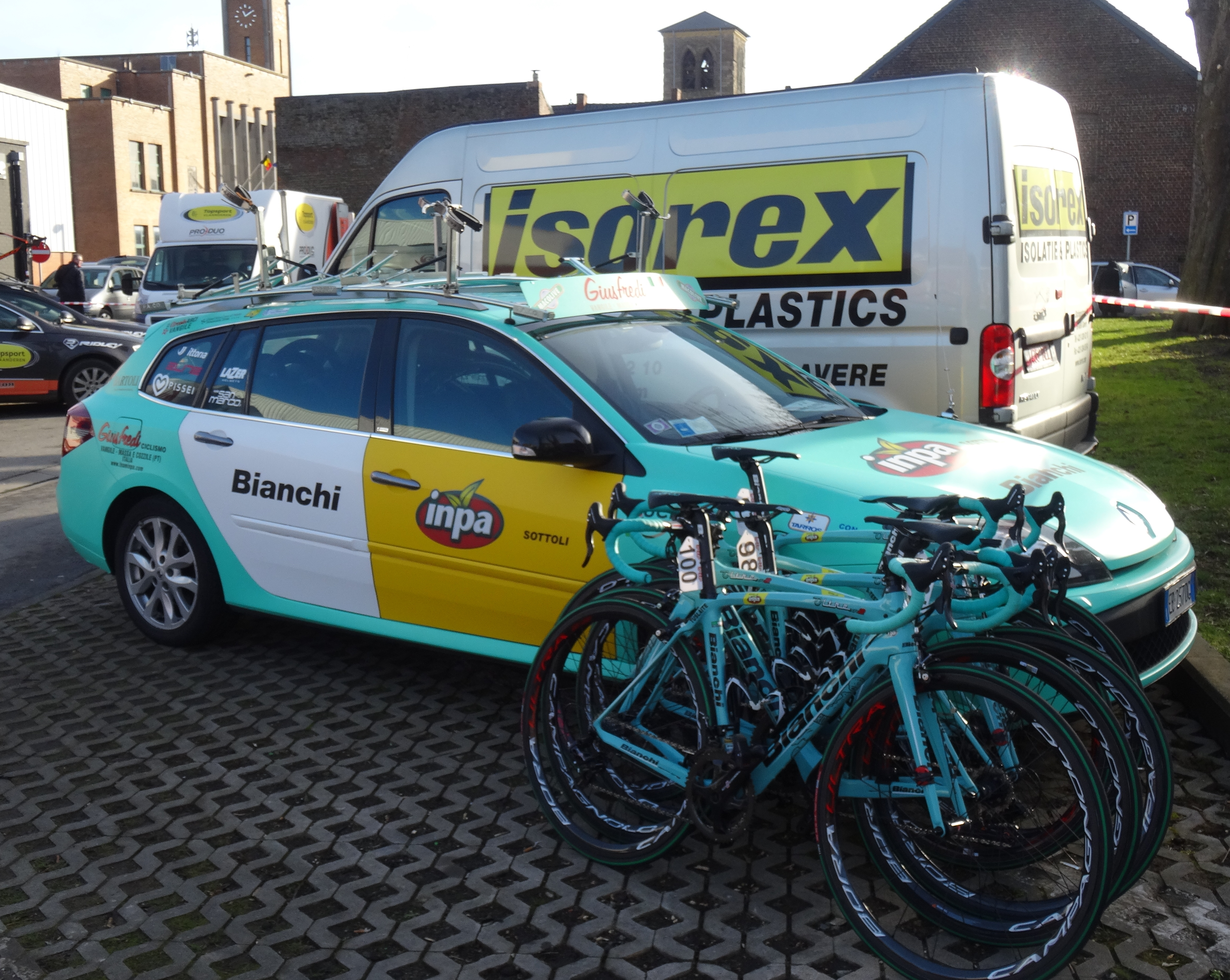 Reportage réalisé le mercredi 4 mars à l'occasion du départ du Samyn des Dames 2015 et du Samyn 2015 à Quaregnon, Belgique.